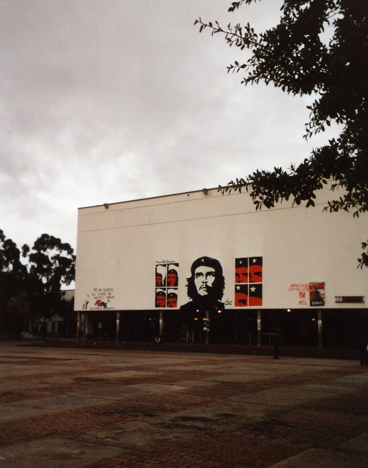 Universidad Nacional, Bogotá. Photo: Soman